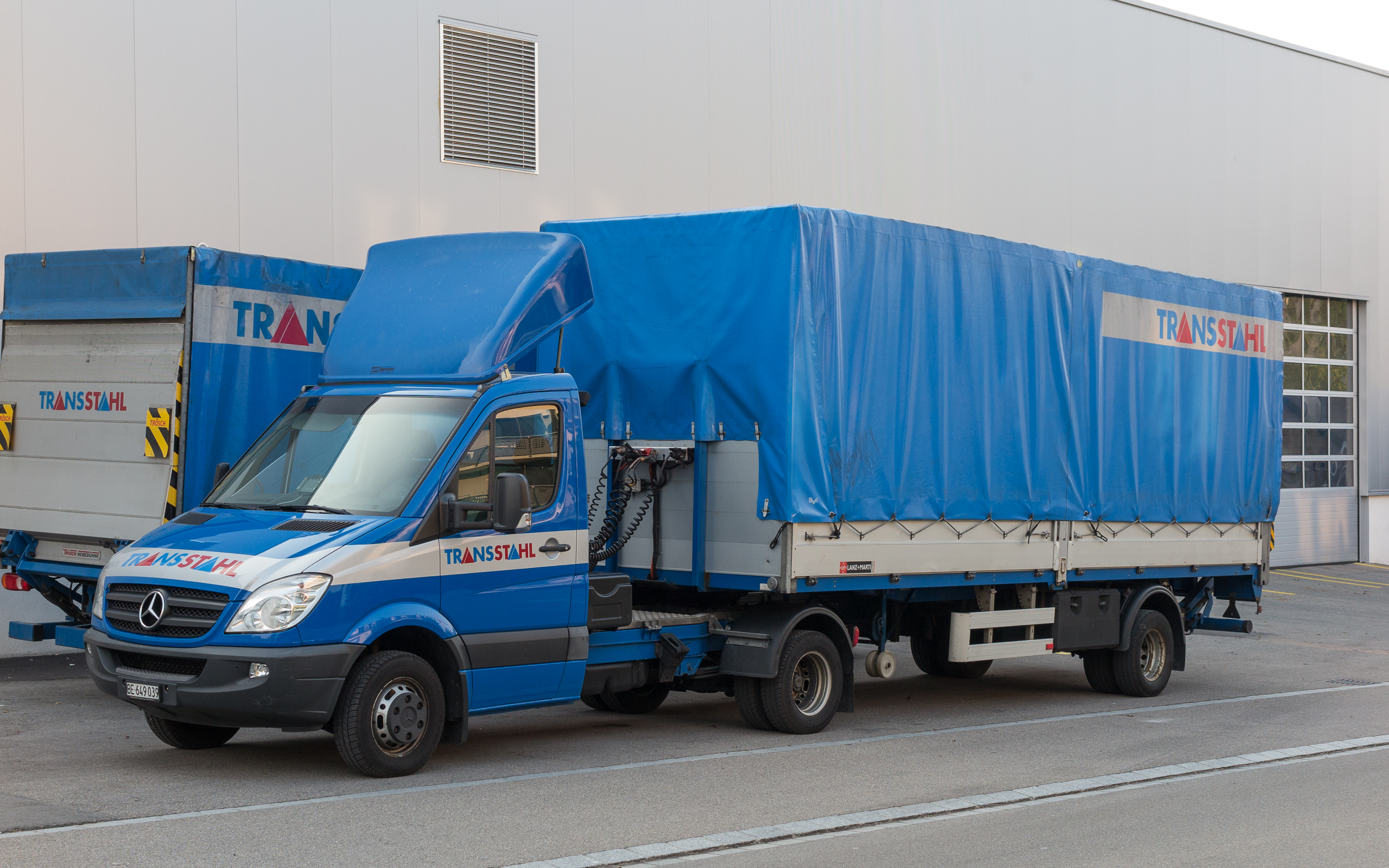 Mercedes-Benz Sprinter als Sattelzugmaschine